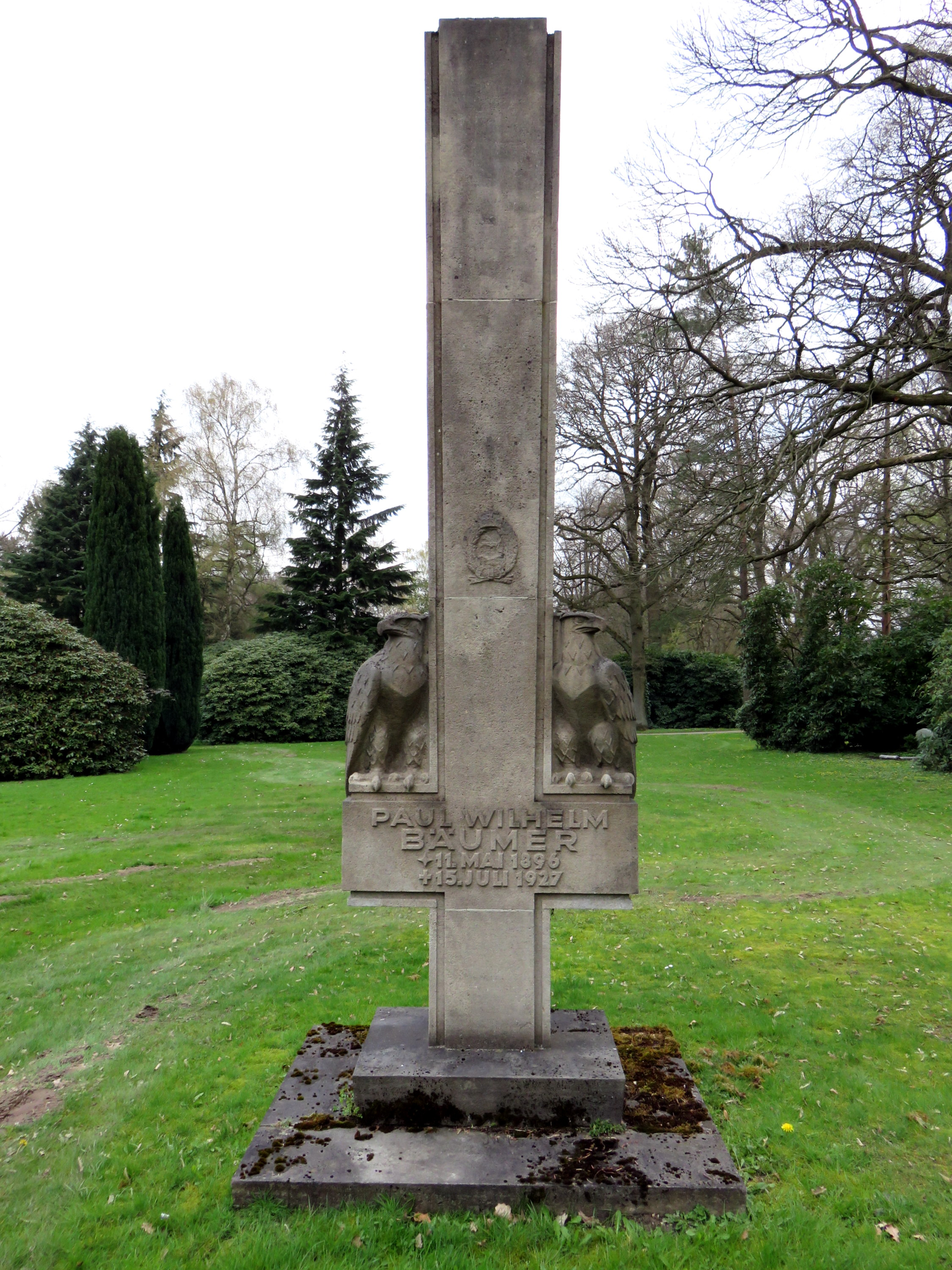 Muschkalk-Grabmal des deutschen Bildhauers Richard Kuöhl zu Ehren des 1927 abgestürzten deutschen Jagdfliegers Paul Wilhelm Bäumer. Lage: Planquadrat H 6 (unweit Ehrenanlage Polizeigräber Blutbuche) auf dem Hamburger Friedhof Ohlsdorf.